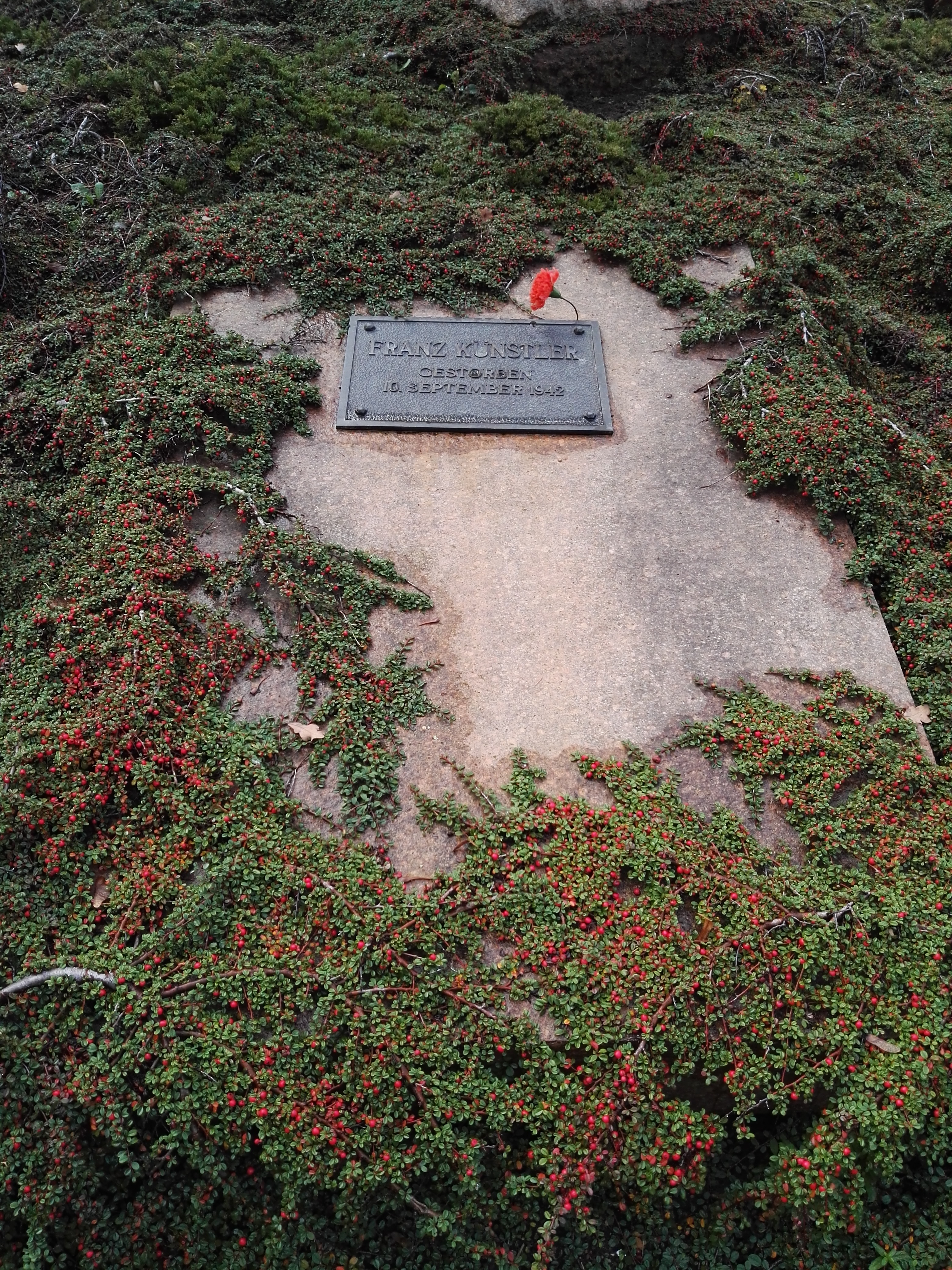 Grab von Franz Künstler in der Gedenkstätte der Sozialisten auf dem Zentralfriedhof Friedrichsfelde in Berlin-Lichtenberg